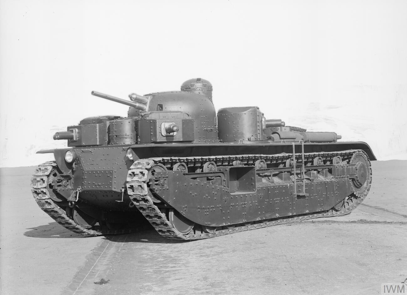 Vickers Independent Heavy Tank (A1E1).